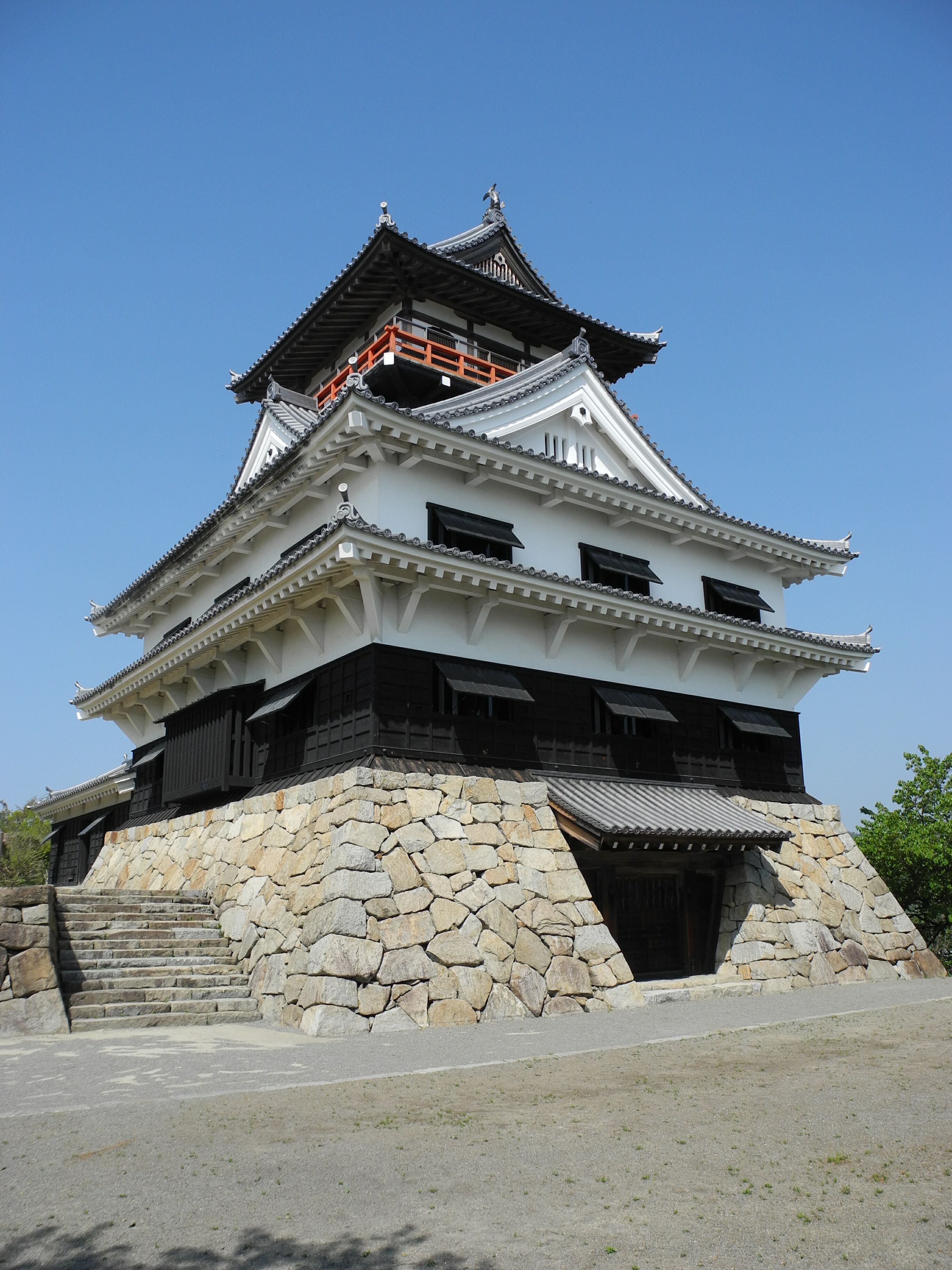 川之江城 天守閣(復元施設) - 愛媛県四国中央市